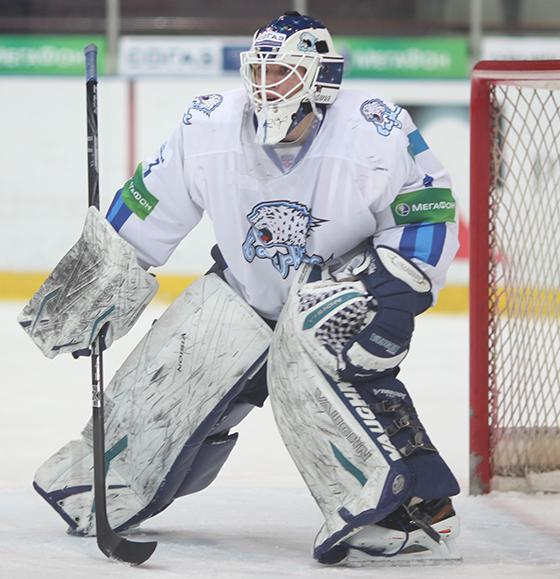 Вратарь астанинского «Барыса» Павел Полуэктов во время матча чемпионата КХЛ против новокузнецкого «Металлурга» 7 января 2013 года.